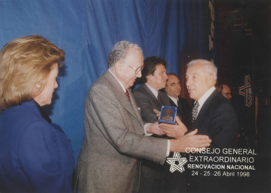 Aparecen en la fotografía: Alberto Cardemil, María Angelica Cristi, Alberto Espina, participando del Consejo Extraordinario de Renovación Nacional, celebrado los días; 24, 25 y 26 de abril de 1998.